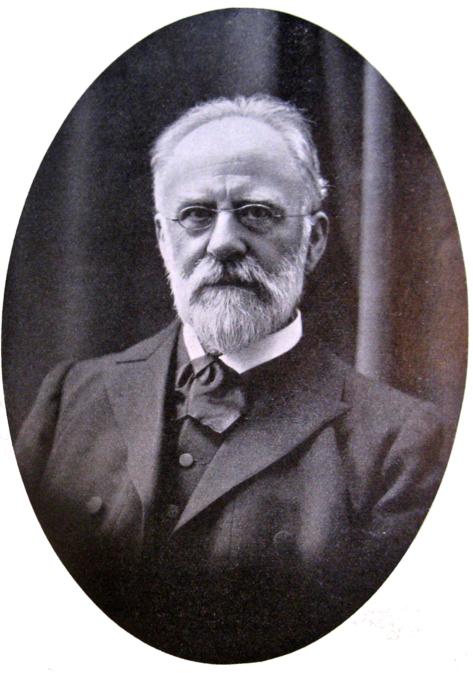 Emil Christian Hansen (8. maj 1842 - 27. august 1909) var en dansk ekspert i gæringsfysiologi i forbindelse med ølbrygning, især gæreprocessen.